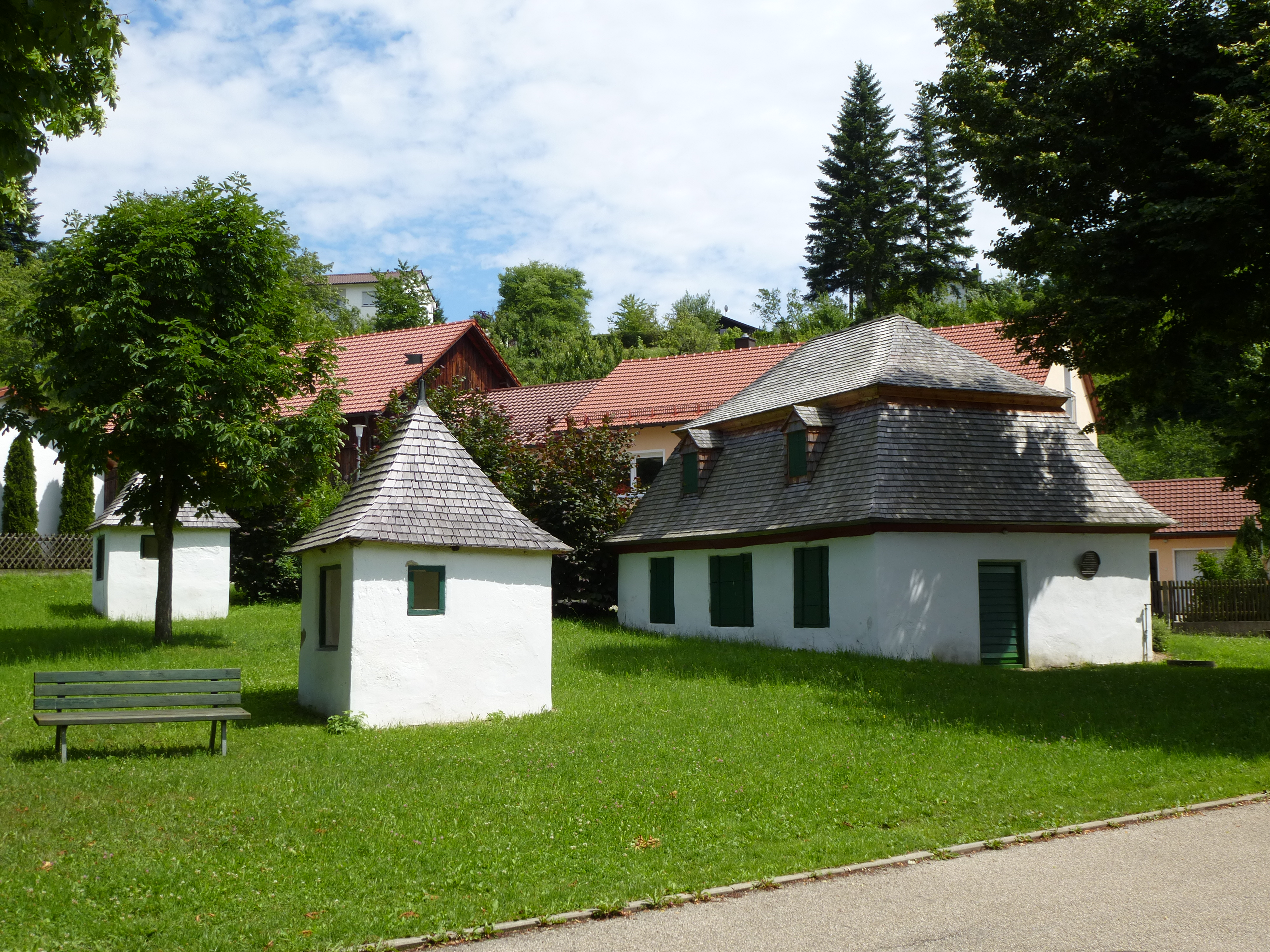 Schußhütte (ehem. Schießhaus) in Wörth a.d.Donau